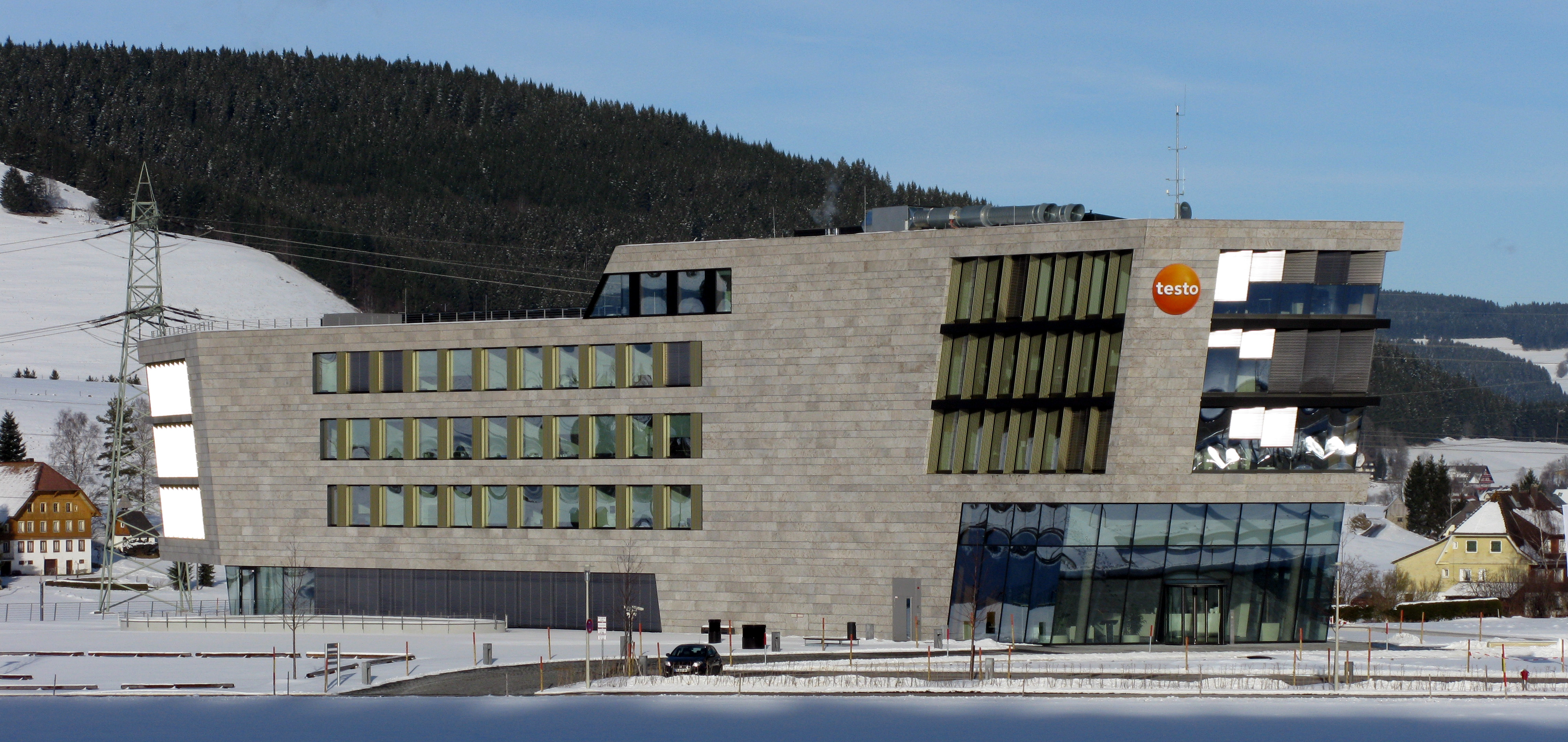 Testo in Titisee, Sacker Architekten (2012)